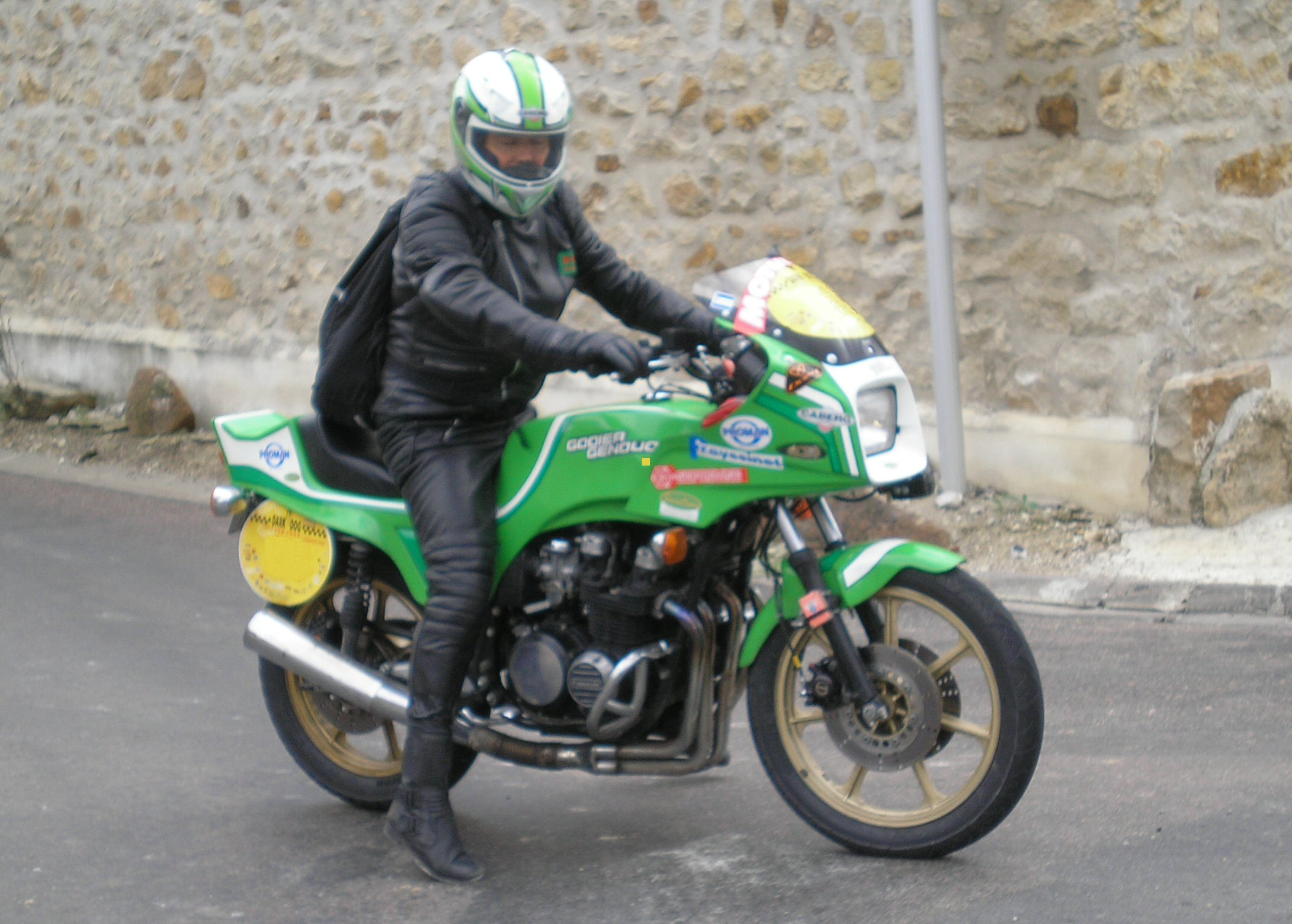 Kawasaki Z750 préparée par Godier Genoud, participant au Dark Dog Moto Tour. Auteur : Dédélembrouille